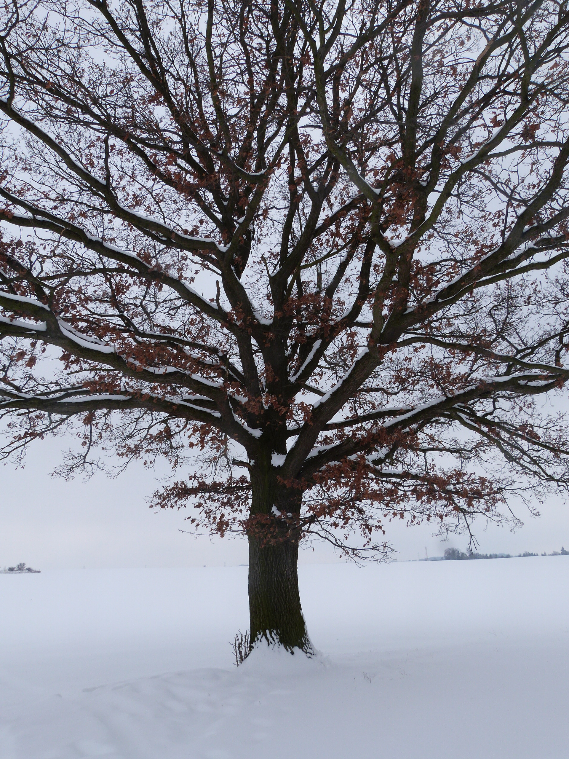 Dub letní (Quercus robur), památný strom nedaleko Točné, Praha 12